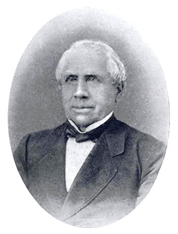 Gustav Körner (1809-1896)